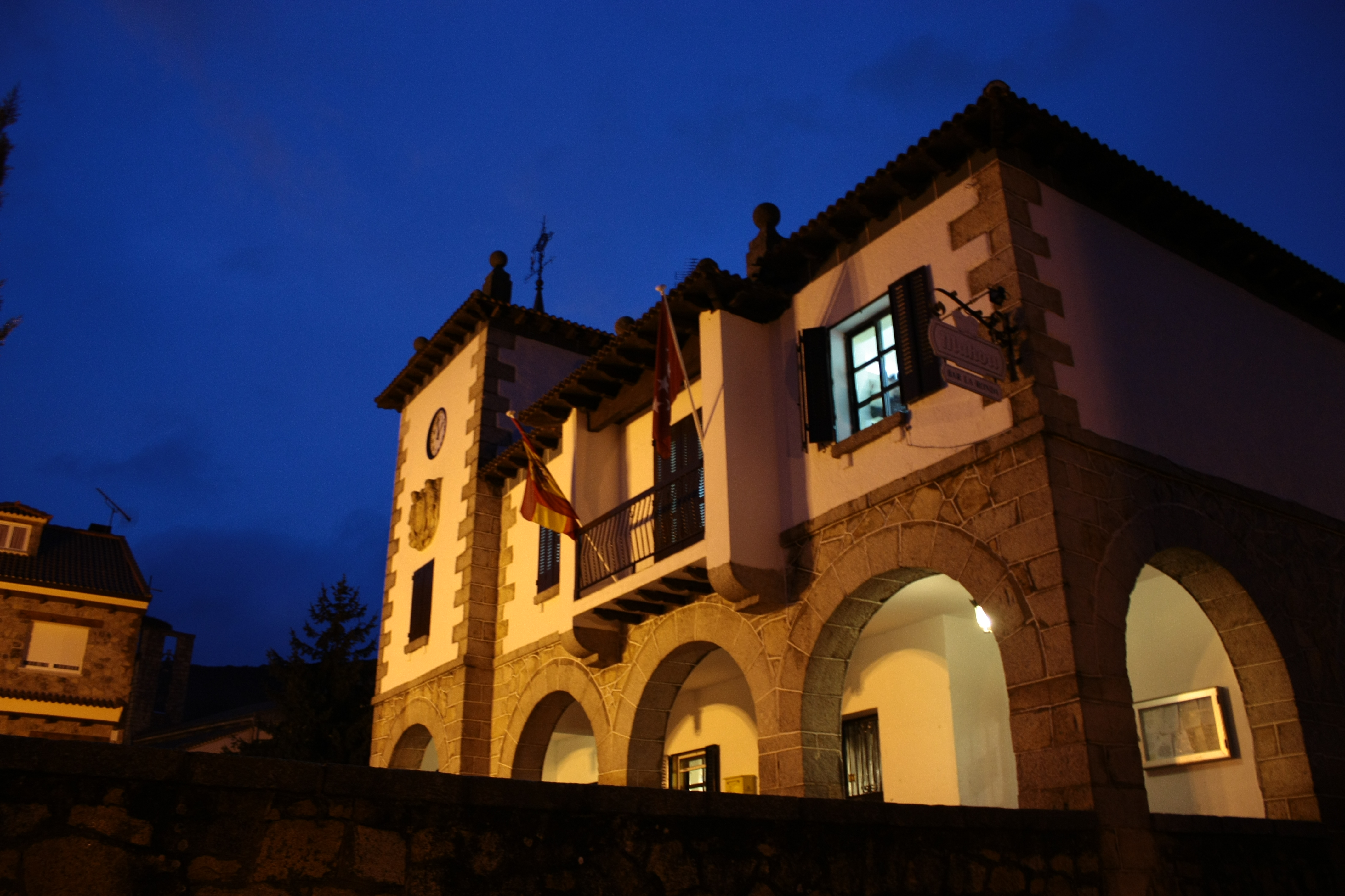 Se trata del ayuntamiento del municipio de Navarredonda-San Mámés de noche.